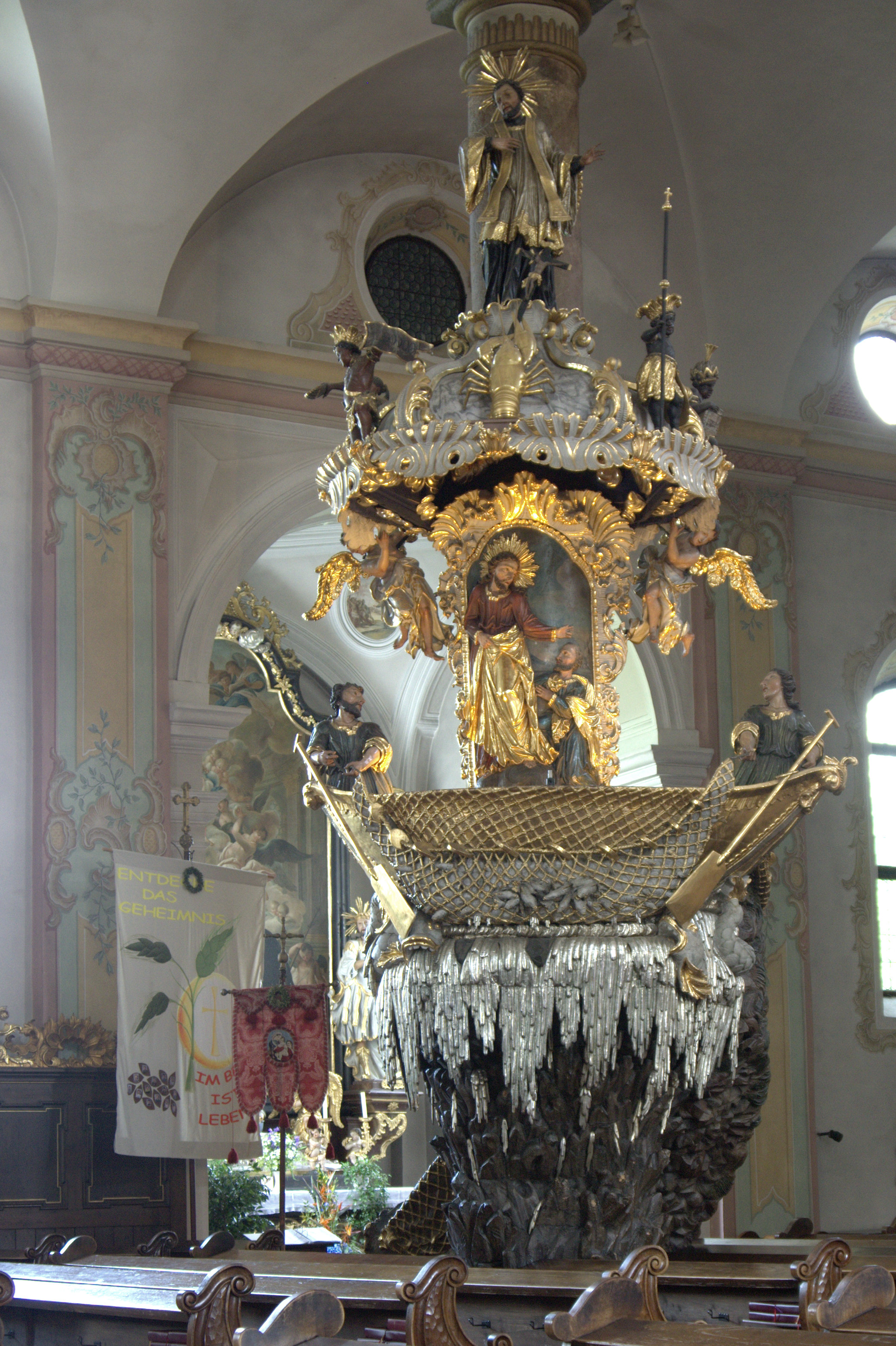 Kath. Pfarrkirche Mariä Krönung, ehem. Jesuitenkirche mit Michaelskapelle